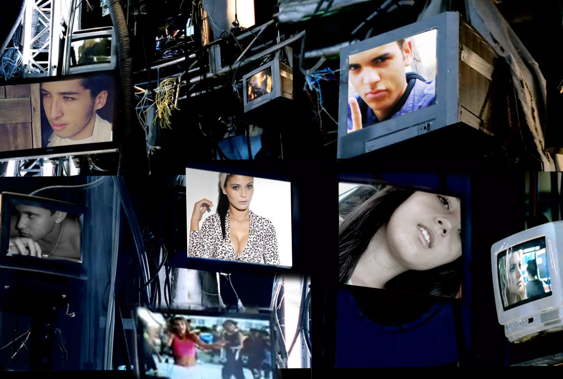 KALLA